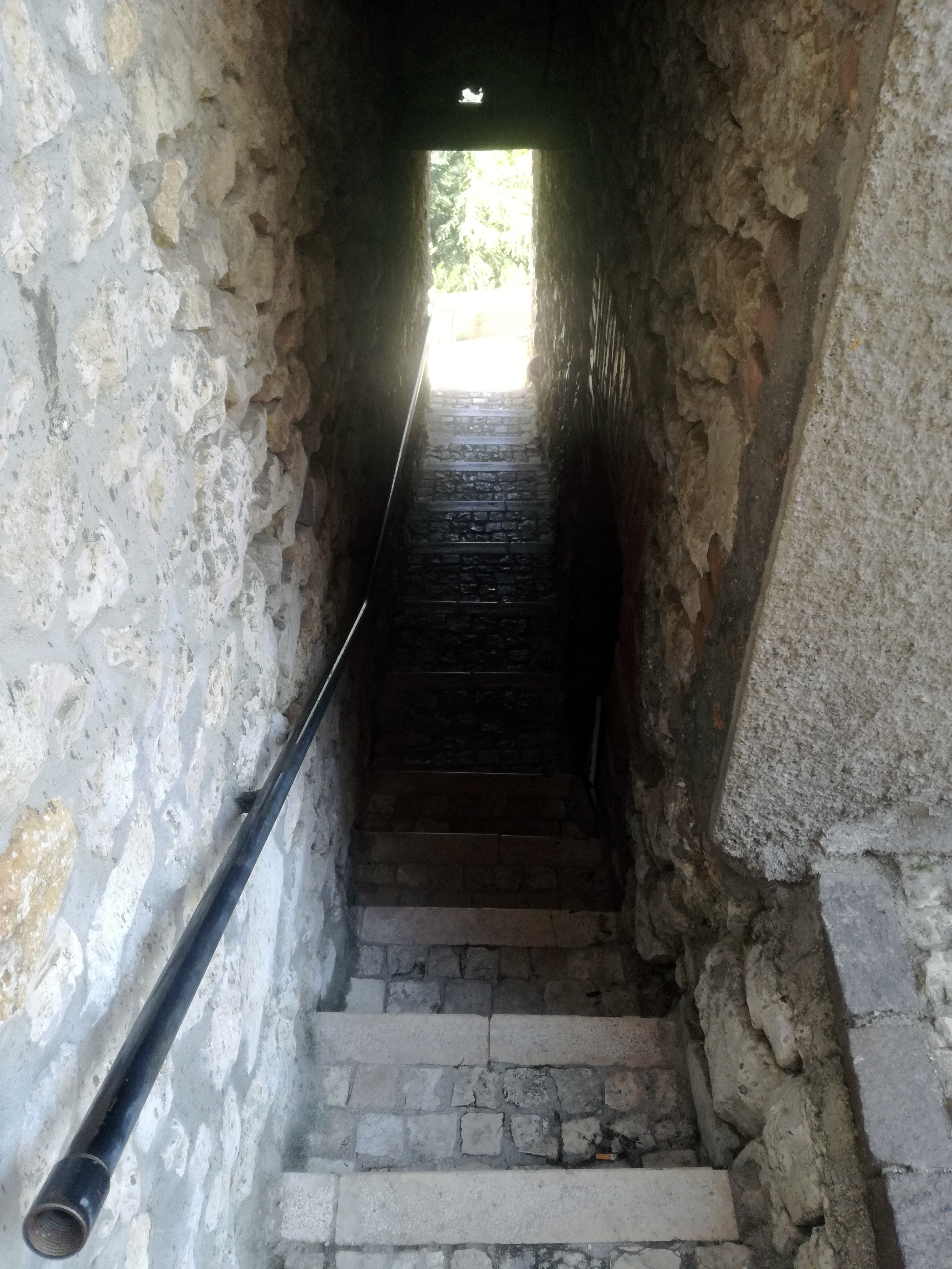 Cosiddetta "postierla", piccolo vicolo di Rocca Massima